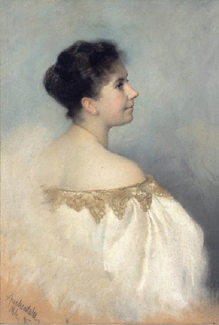 Ritratto di Emma Scheid Auchentaller